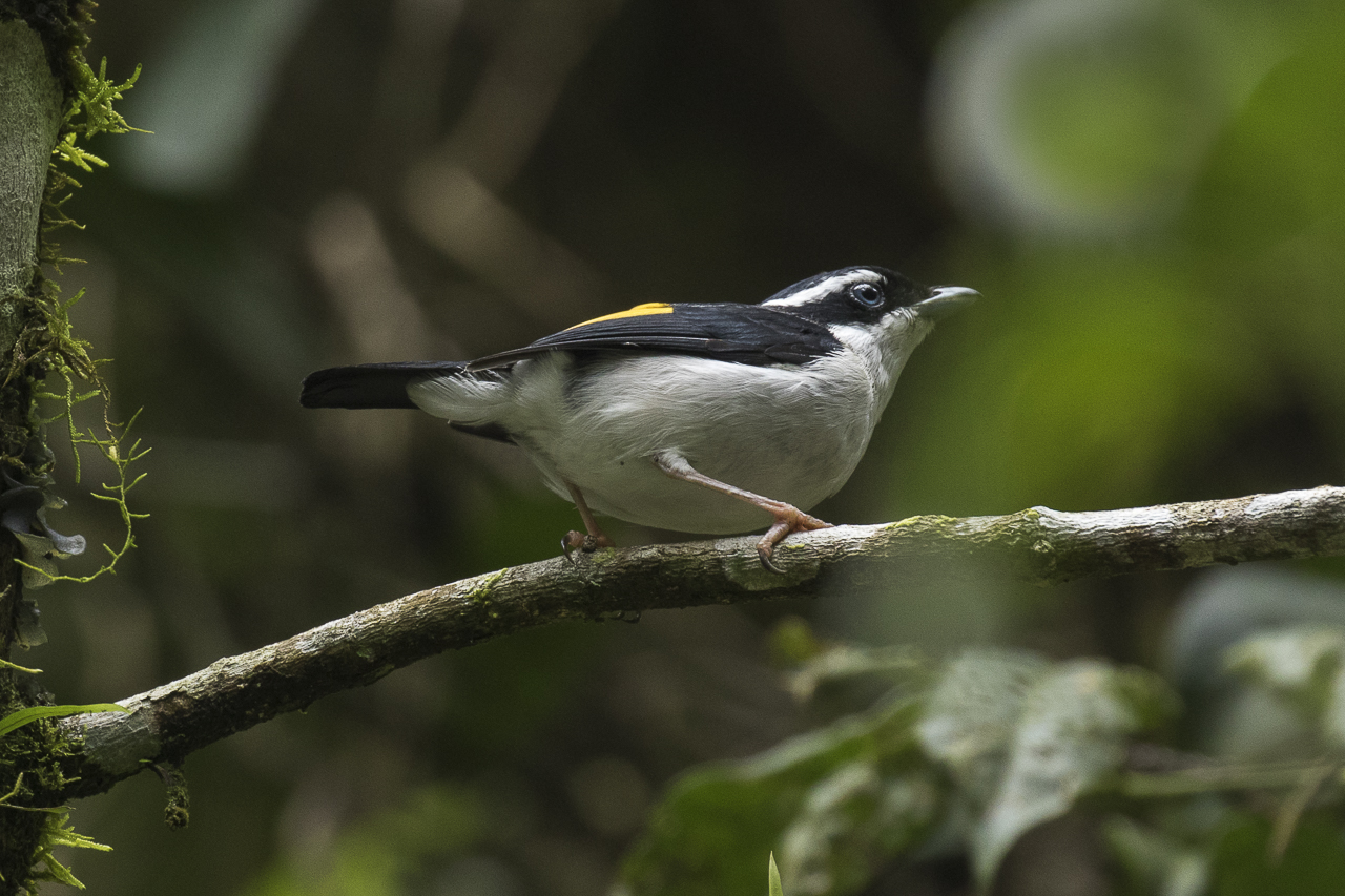 Pied Shrike-Babbler - Gunung Gede_MG_4305